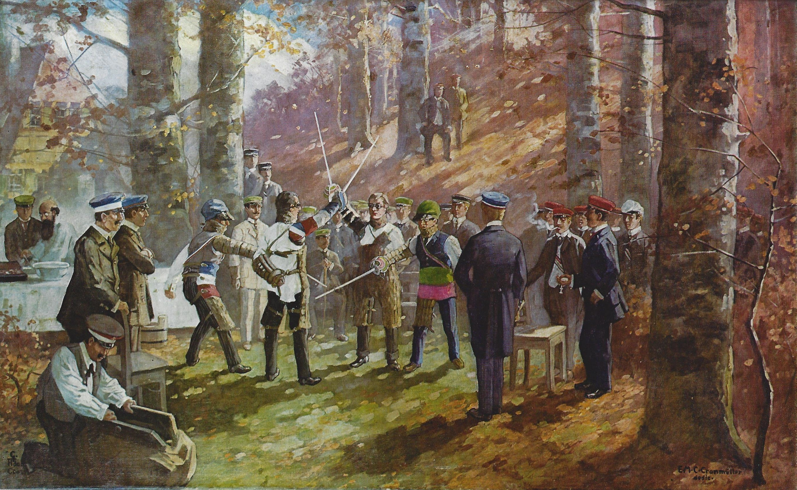 Bestimmtag der vier Tübinger Corps Franconia, Rhenania, Suevia und Borussia (Ölgemälde 160 x 100 cm)